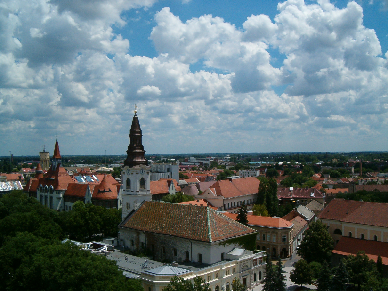 Ref. templom (Kecskemét, Kossuth tér) This is a photo of a monument in Hungary. Identifier: 2250